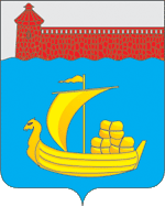 Герб Лысковского муниципального района Нижегородской области (2006 год)